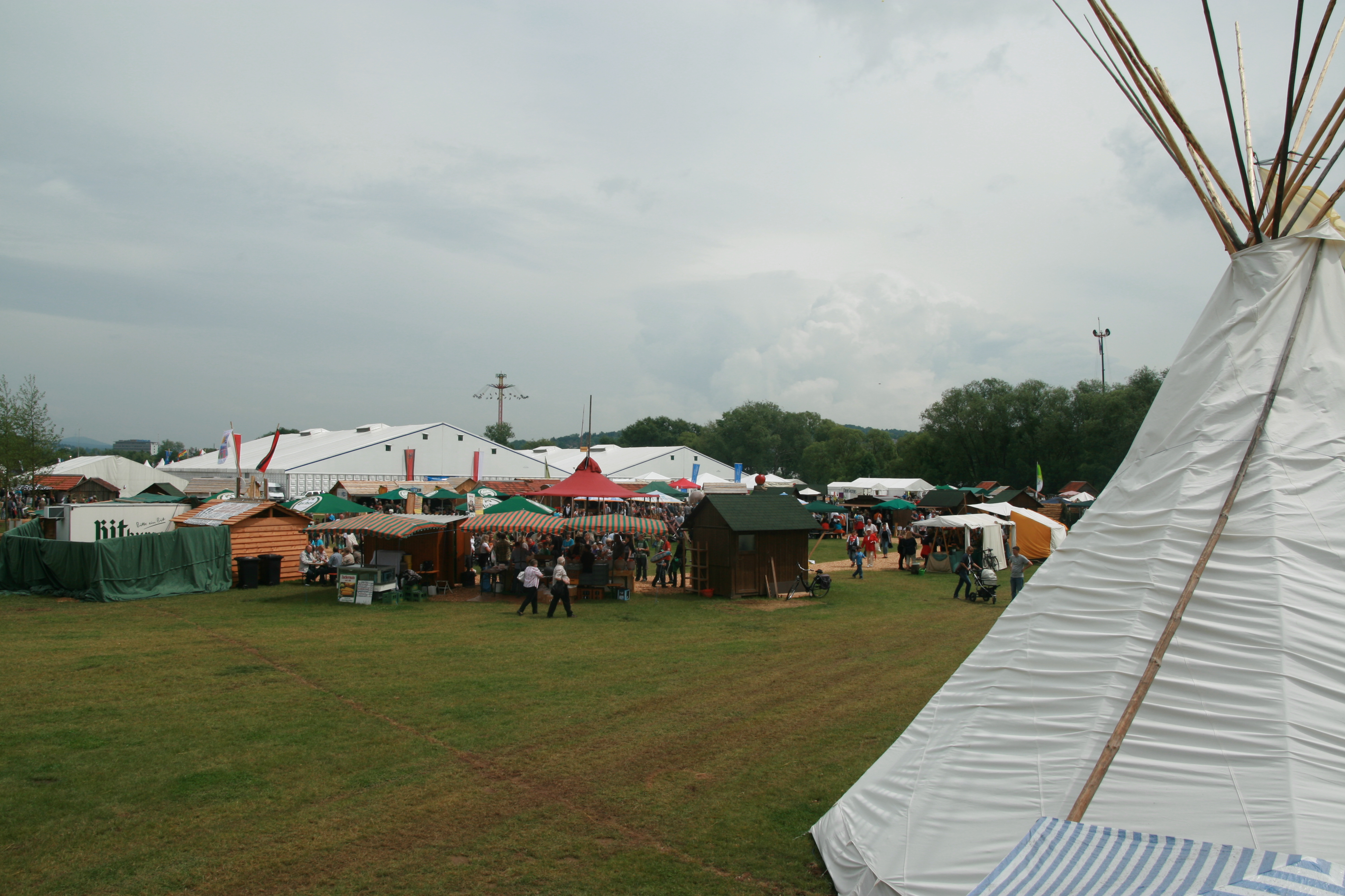 Halle 1 (links) und 2 (rechts) der Landesausstellung auf dem Hessentag 1.-10- Juni 2012 im Wetzlarer Bodenfeld, im Vordergrund die Ausstellung "Der Natur auf der Spur", im Hintergrund das Kettenkarussel von FFH